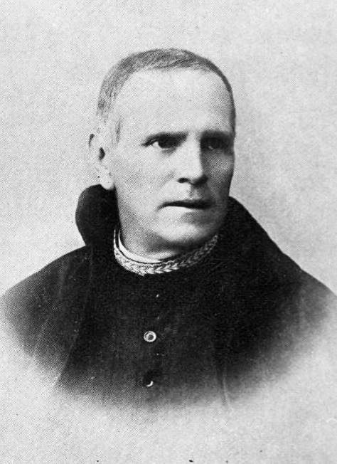 Sacerdote Manuel Leal, fundador de la Iglesia de San Felipe en la Antigua Guatemala.